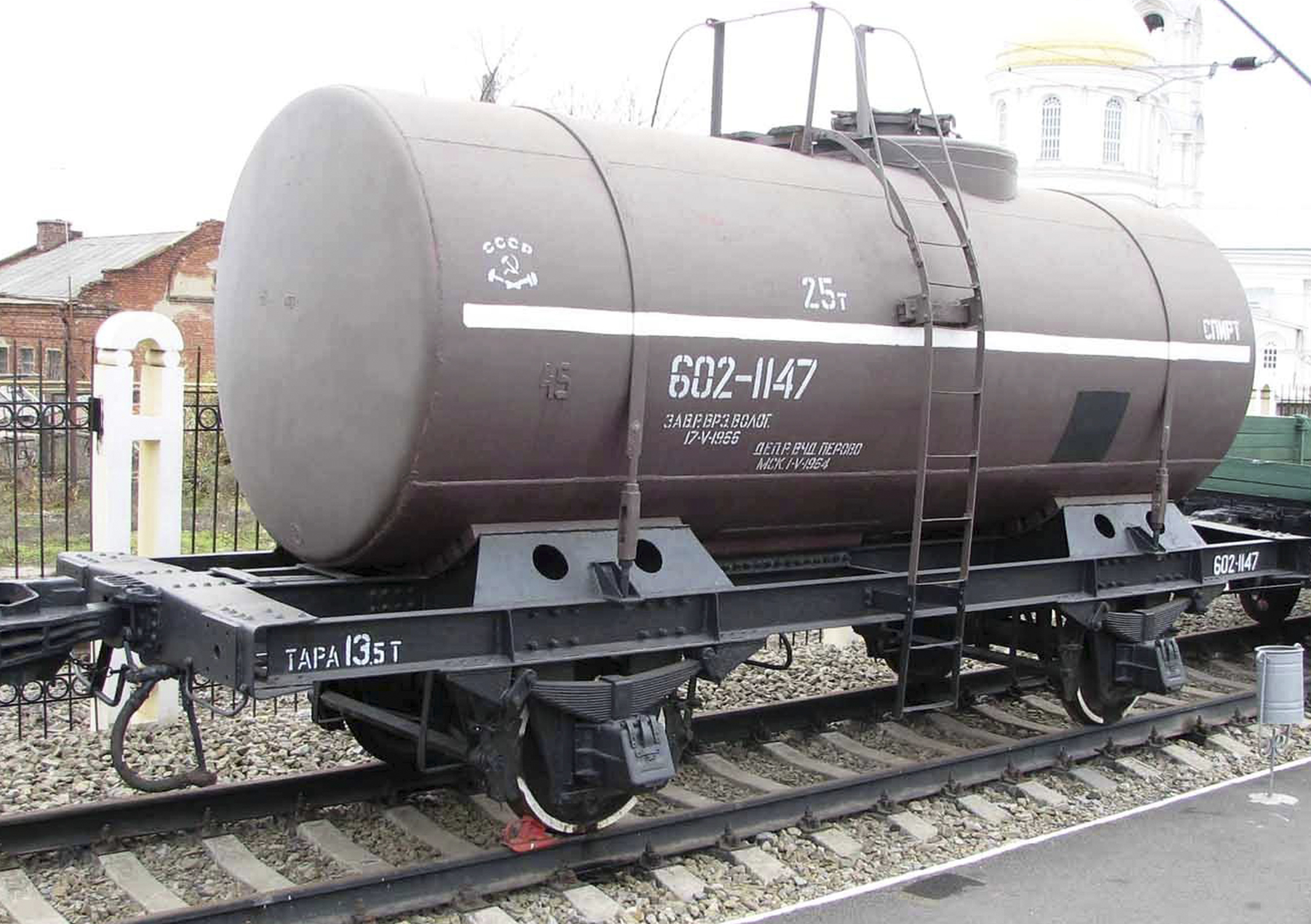 Цистерна построена в 1940-х годах